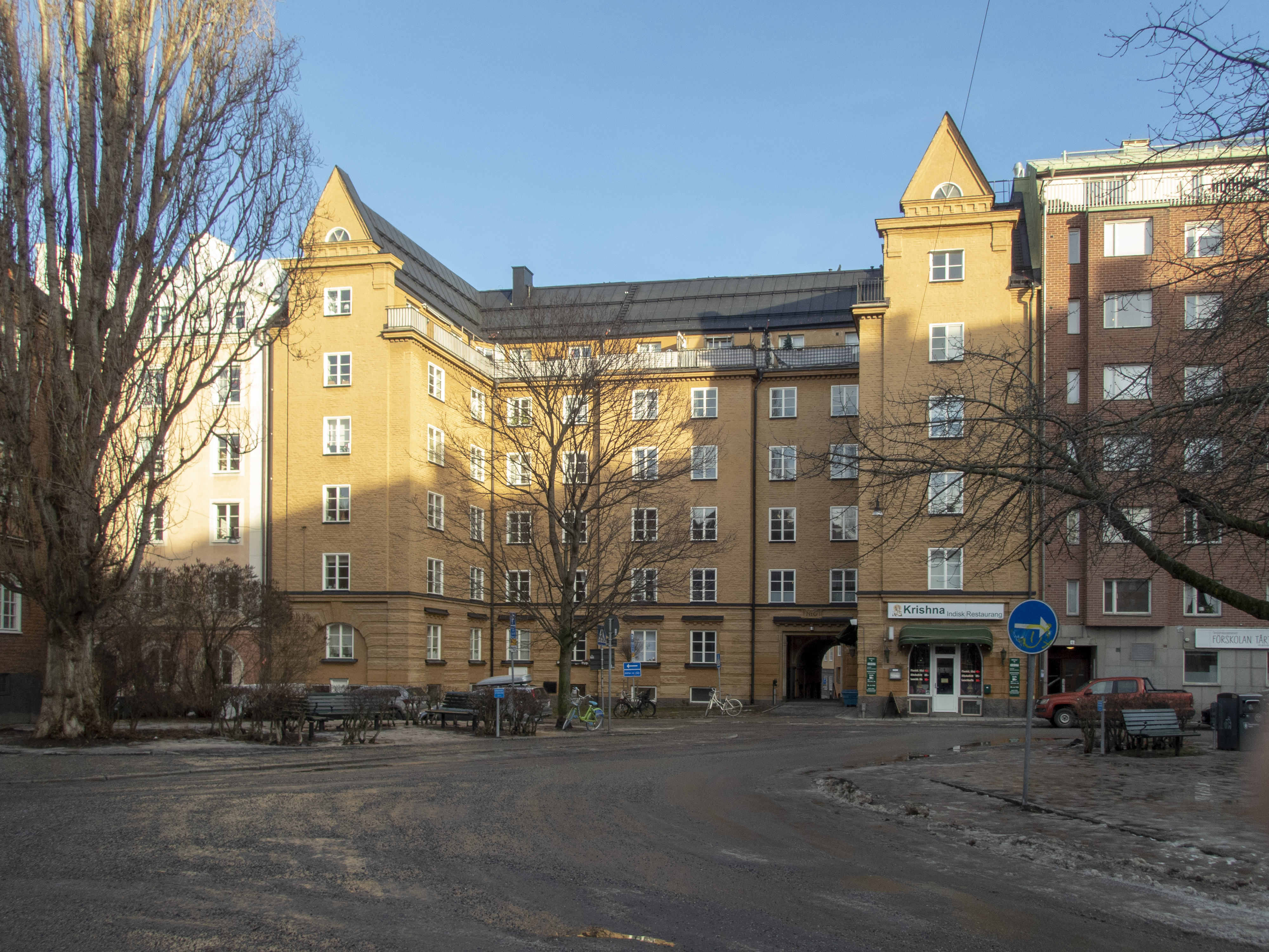 Hugin 12, Dannemoragatan 6, Stockholm Nybyggnadsår 1925 - 1926 AB Arkitekt & Byggnadsbyrån (Arkitekt) AB Byggindustri (Byggmästare) Ivar Nyqvist (Byggherre)